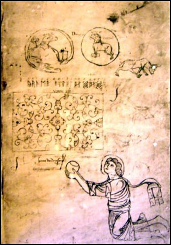 Orosius: Volume III: The Tollemache Orosius, British library (Orosius' Verdenshistorie).